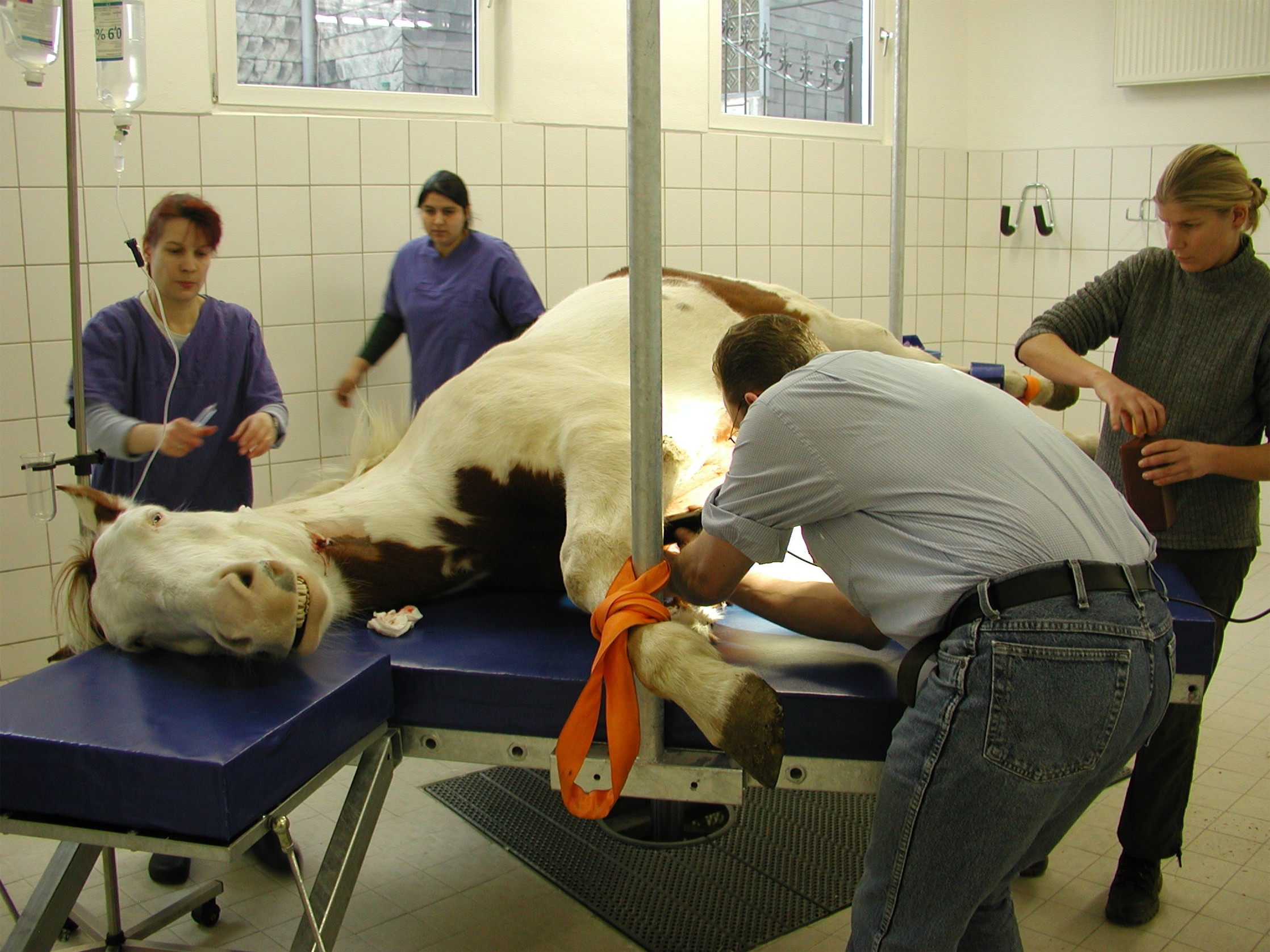 Tierarzt bei der Operation eines Pferdes. Aufgenommen mit Olympus C3040.